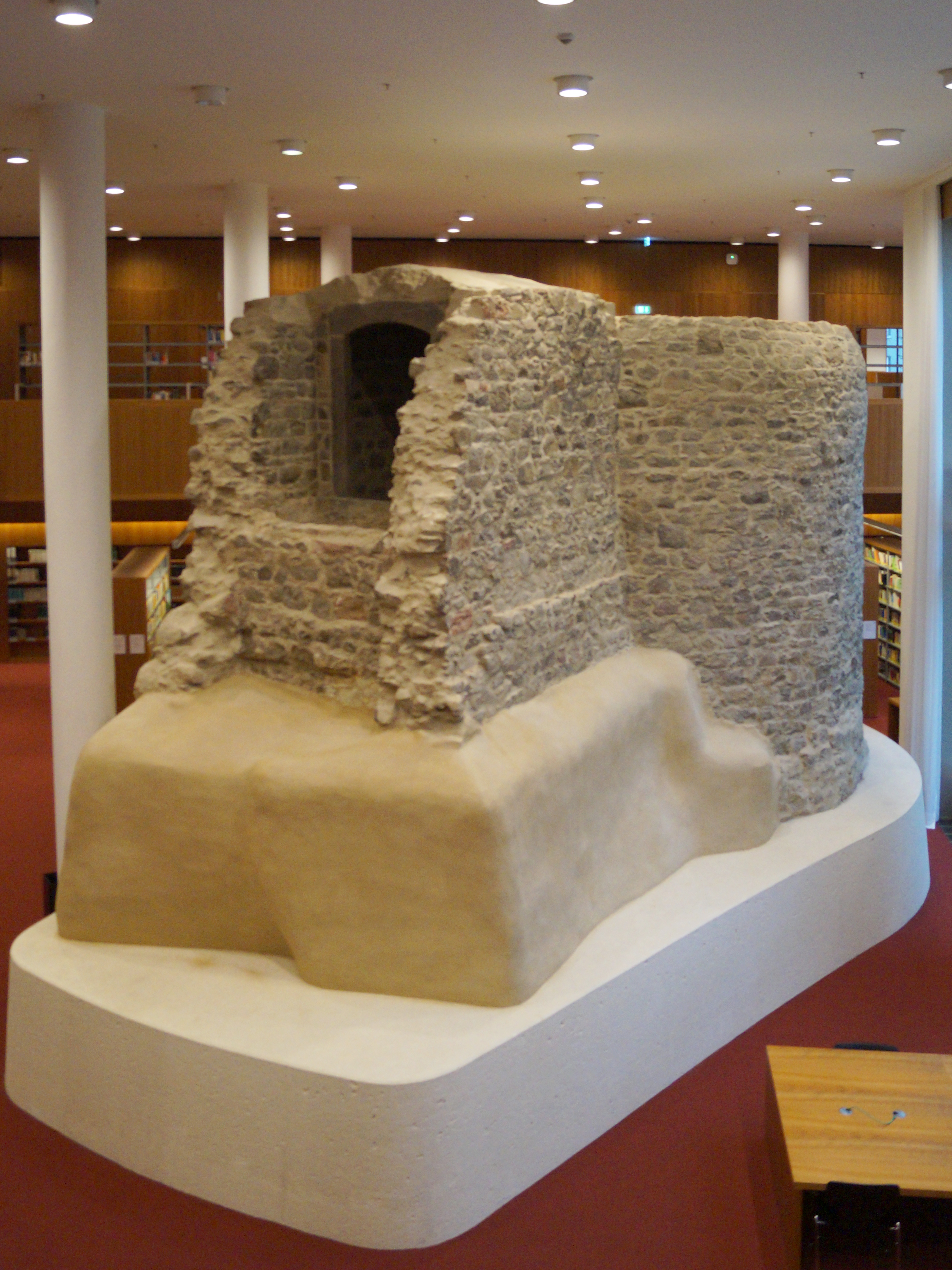 Konservierter Eiskeller "Affenstein" in der gesellschafts- und erziehungswissenschaftlichen Bibliothek auf dem Frankfurter Uni-Campus Westend.